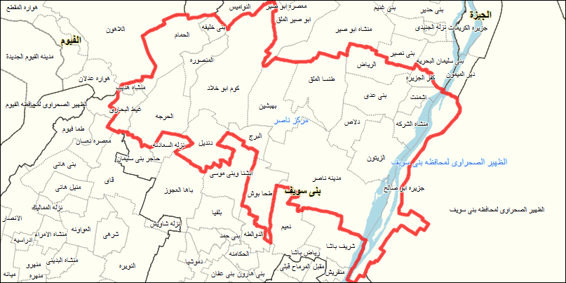 مركز ناصر